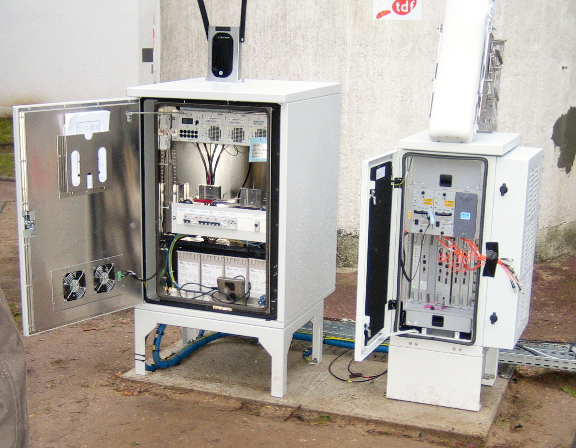 A gauche : équipements pour l’alimentation électrique. A droite : équipements de transmission WiMAX. Voir photos de près et explications ci-dessous.